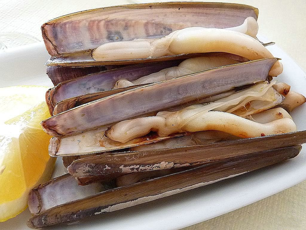 Navajas a la plancha, gallegas.